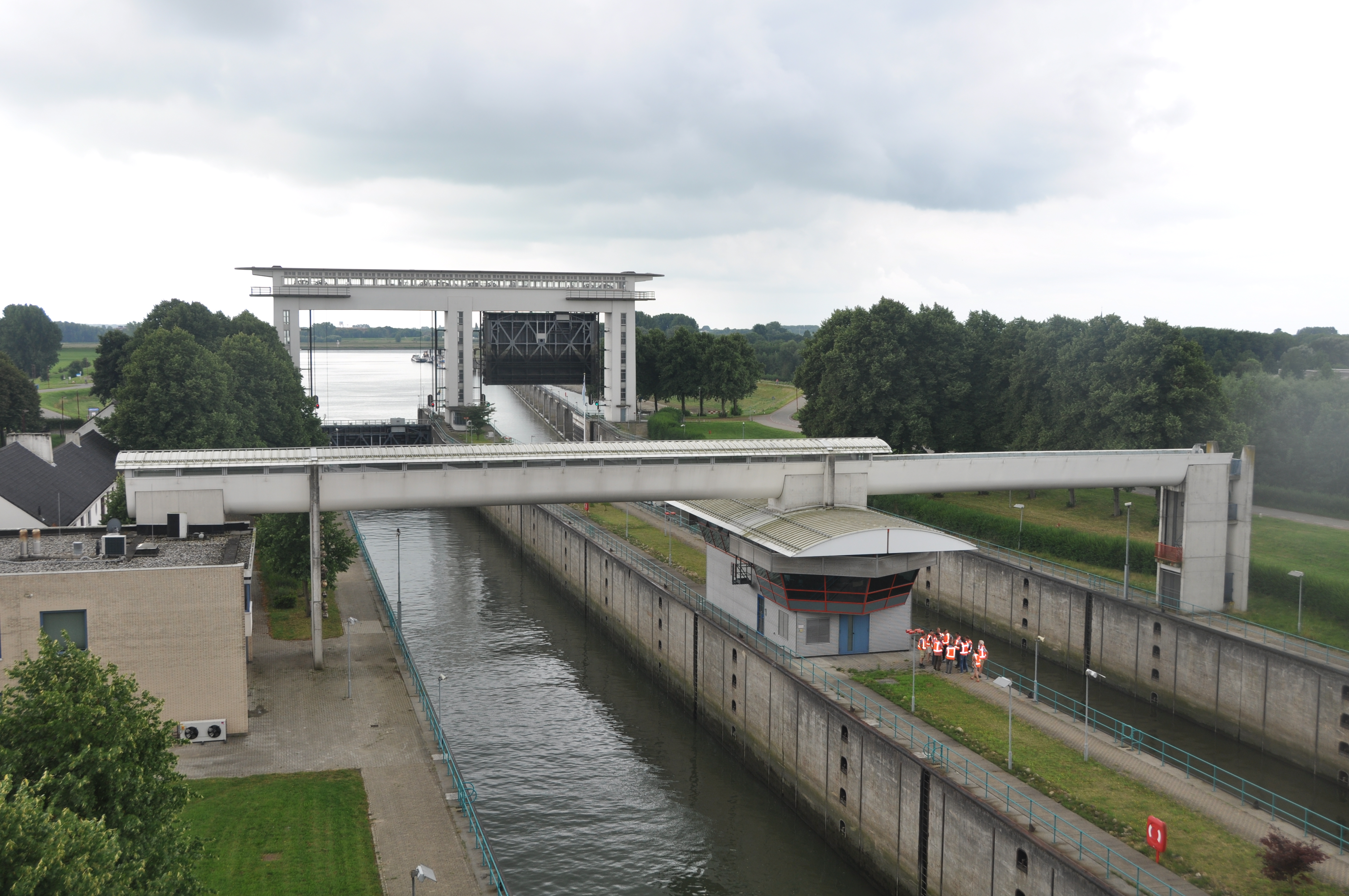 Rondleiding voor de LVBHB tijdens Vreeswijk Vol Vaart 2016.